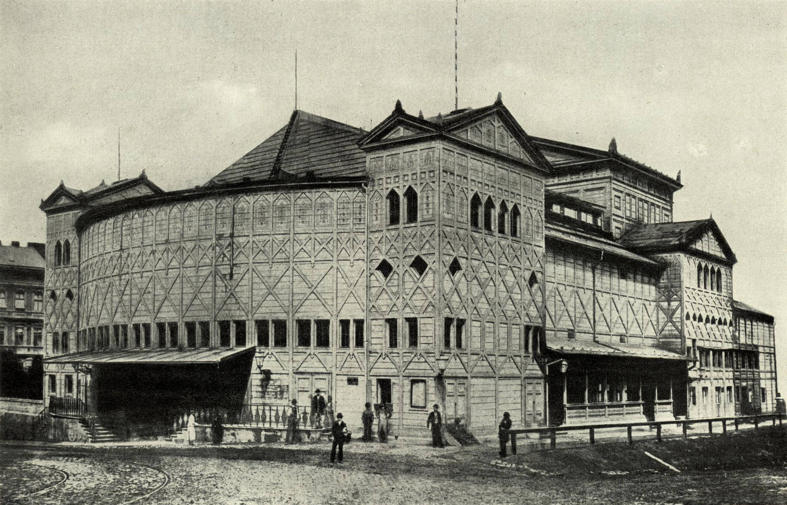 Antonín Baum: Nové české divadlo, Praha, 1876-1885.